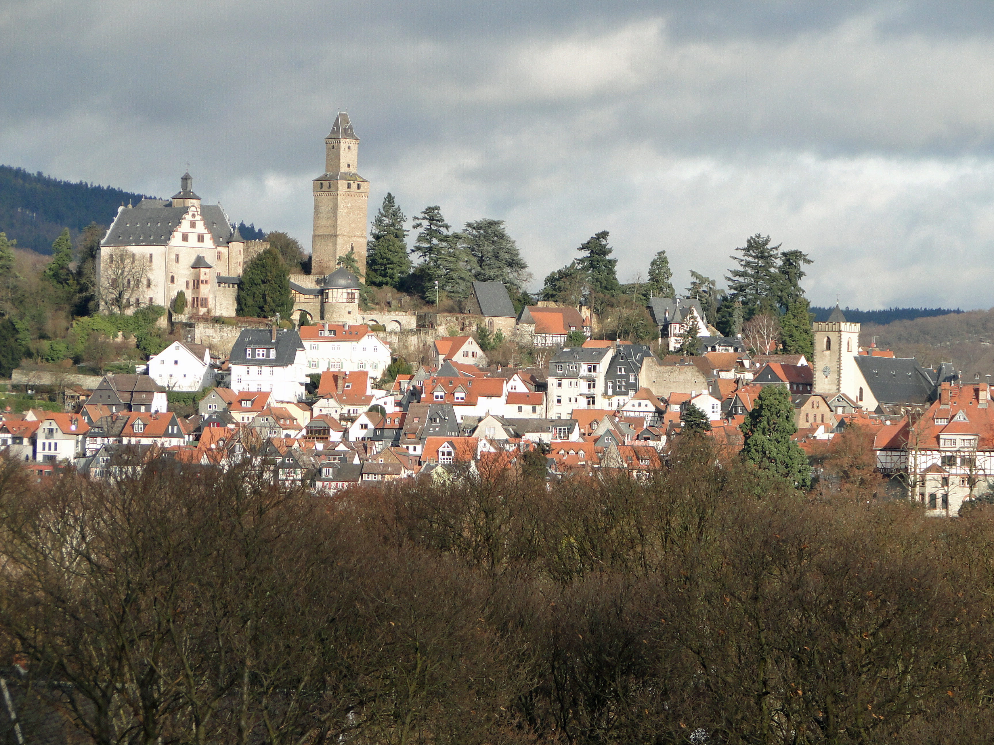 Blick von der Schwalbacher Strasse in Mammolshain (Koenigstein im Taunus) auf die Kronberger Altstadt und Burg.